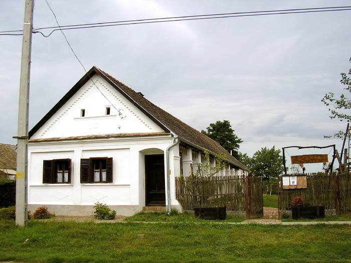 Eperfa tájház, Szaporca